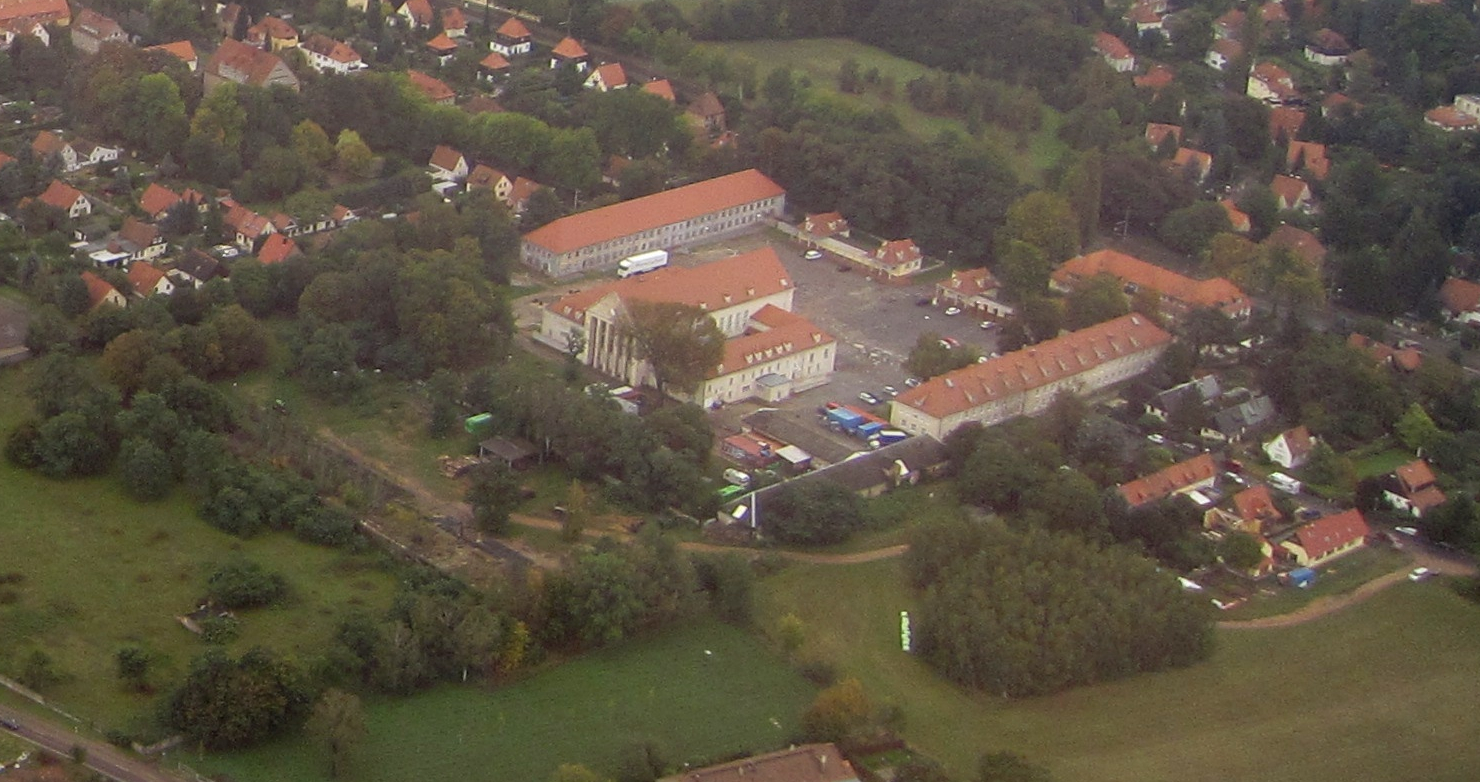 Luftbild Festspielhausgelände, Blick von Nordwest